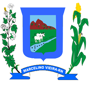 Brasão de Marcelino Vieira, RN, Brasil